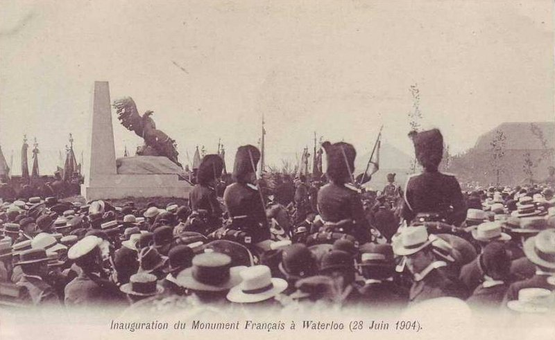 Inauguration du monument aux Français (L'Aigle blessé) en 1904, site de la bataille de Waterloo, Belgique.